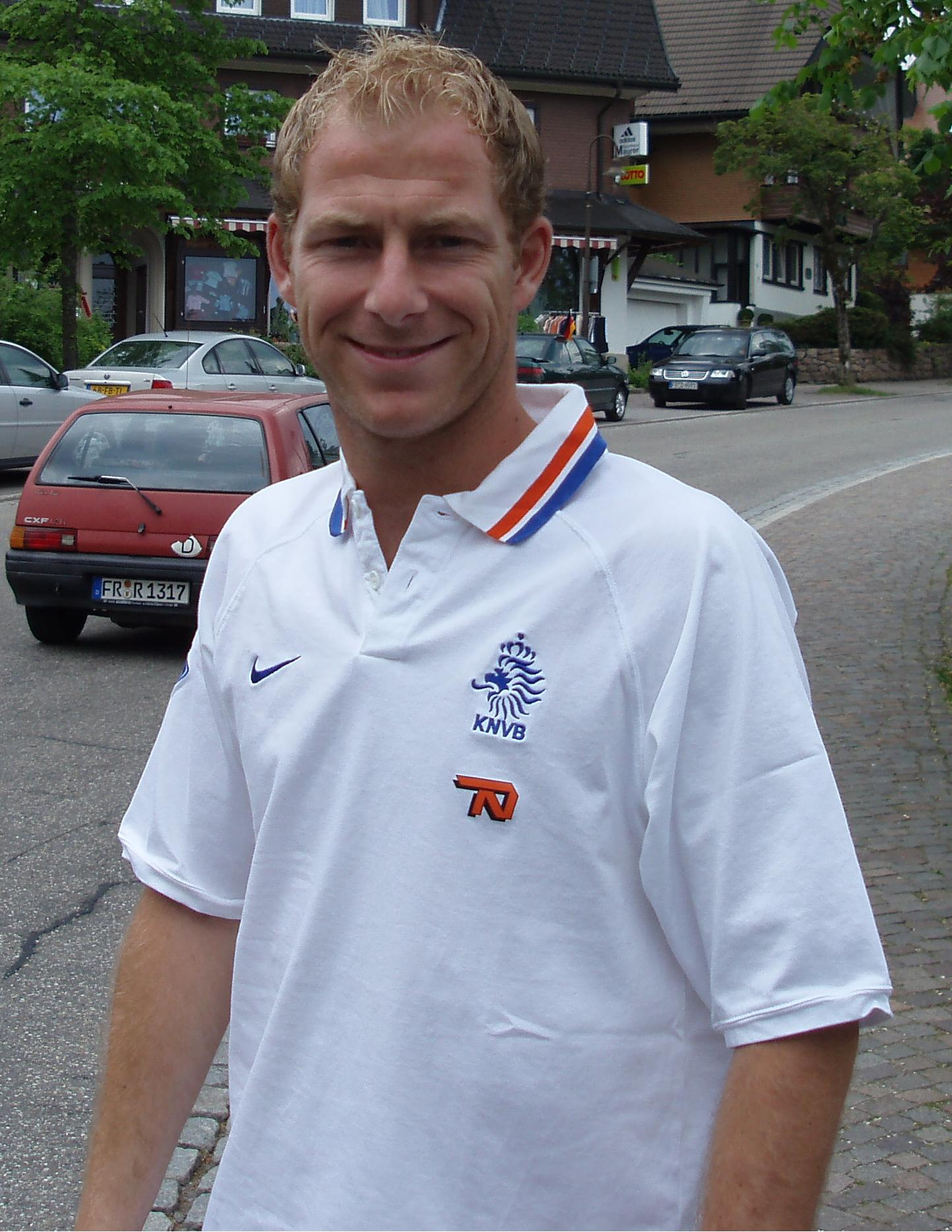 Tim de Cler, Spieler der niederländischen Fußballnationalmannschaft